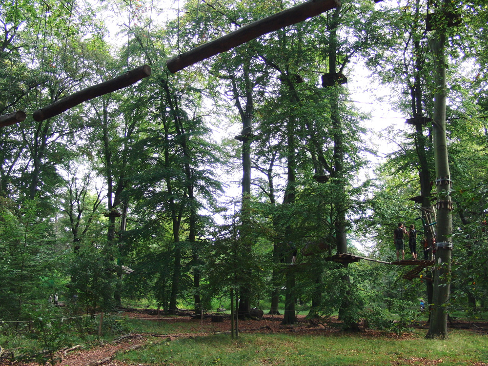 Teilansicht des Waldhochseilgarten Jungfernheide, Berlin